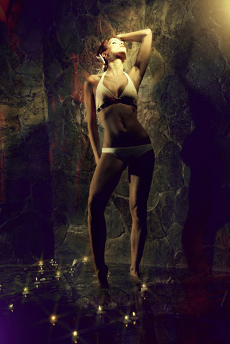 Fotografía: Alejandro Ramirez. Styling: Rous Rosas. Pelo y maquillaje: Víctor Abril. Asistente: Juan C. Neira / Carlos Villamizar. Producción: Laura Pumarejo. Para Vital Spa.